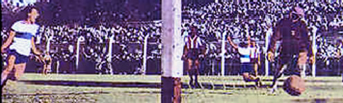 Foto durante el partido Gimnasia-Estudiantes de 1916, ganado por Gimnasia con gol encontra de Ludovica Pastor.